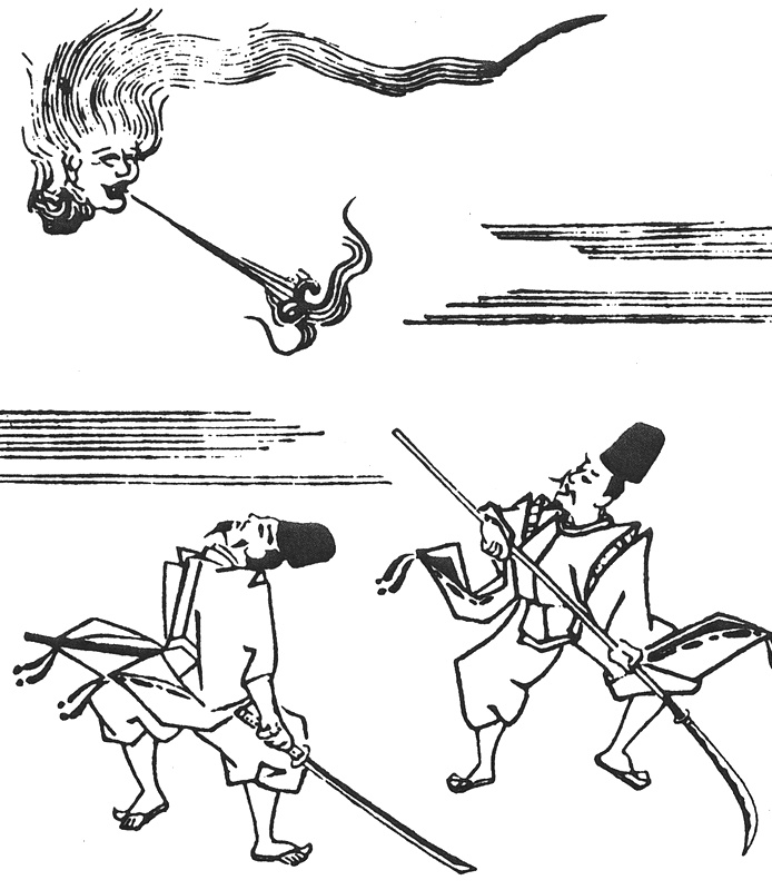 Ubagabi (姥ヶ火) from Saikaku shokoku banashi (西鶴諸国ばなし)